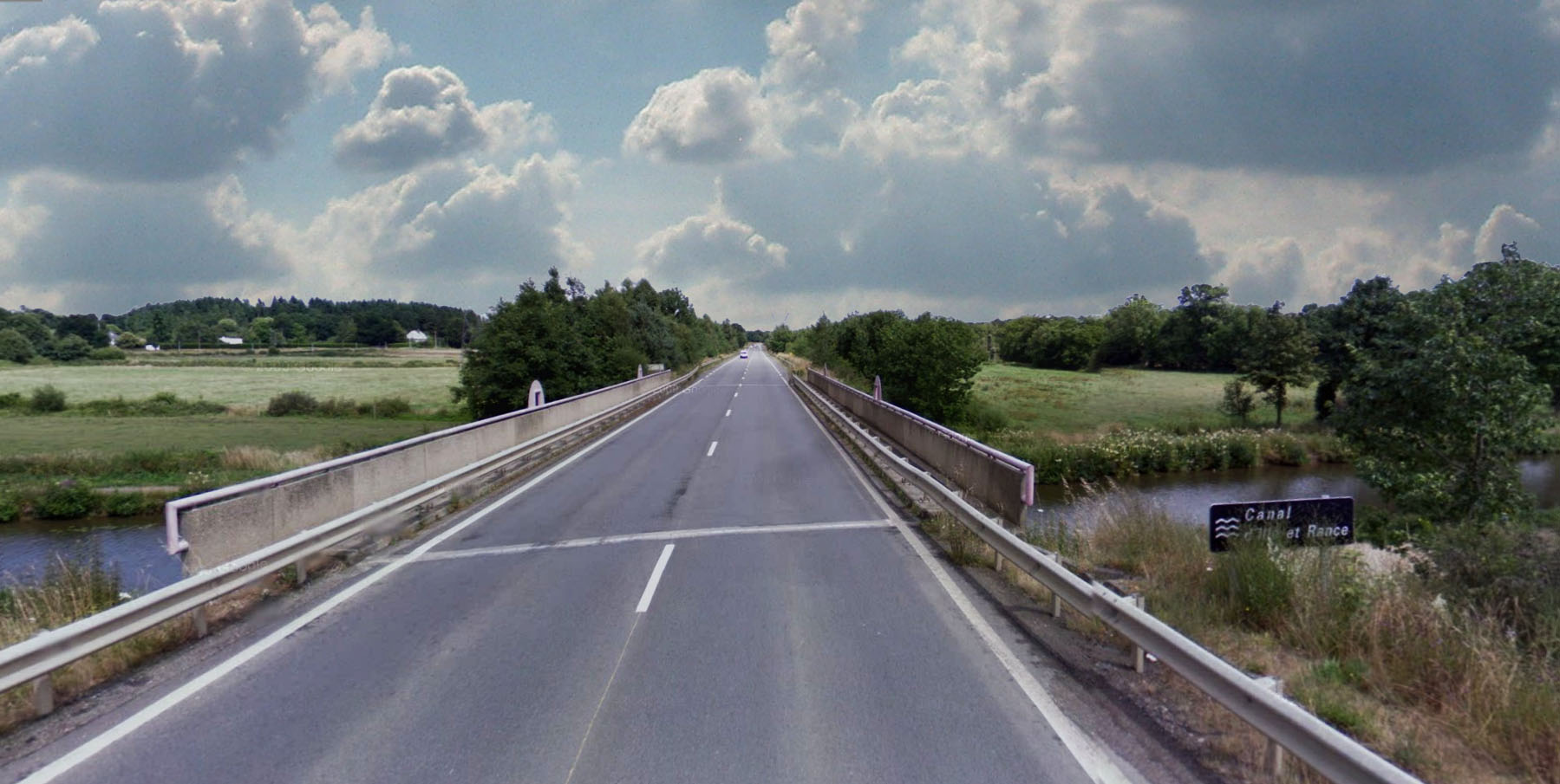 Croisement D29 - Canal d'Ille et Rance à Betton.